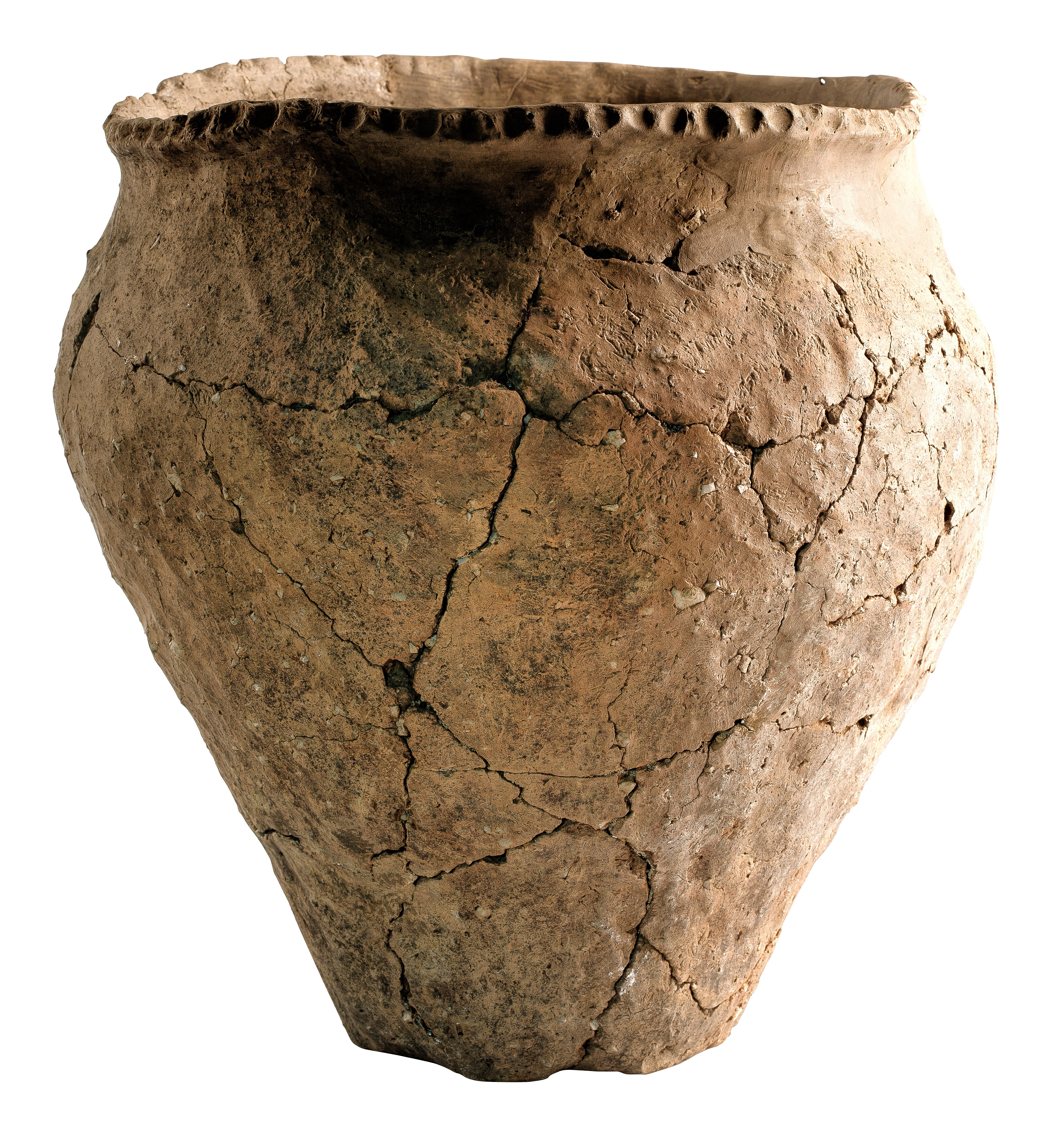 Urne uit de Hilversum/Drakensteintraditie in handgevormd aardewerk, 1100 tot 900 VC, vindplaats: Neerharen/Rekem, Het Kamp (Hangveld), 1984, collectie Gallo-Romeins Museum Tongeren, 84.RE.12